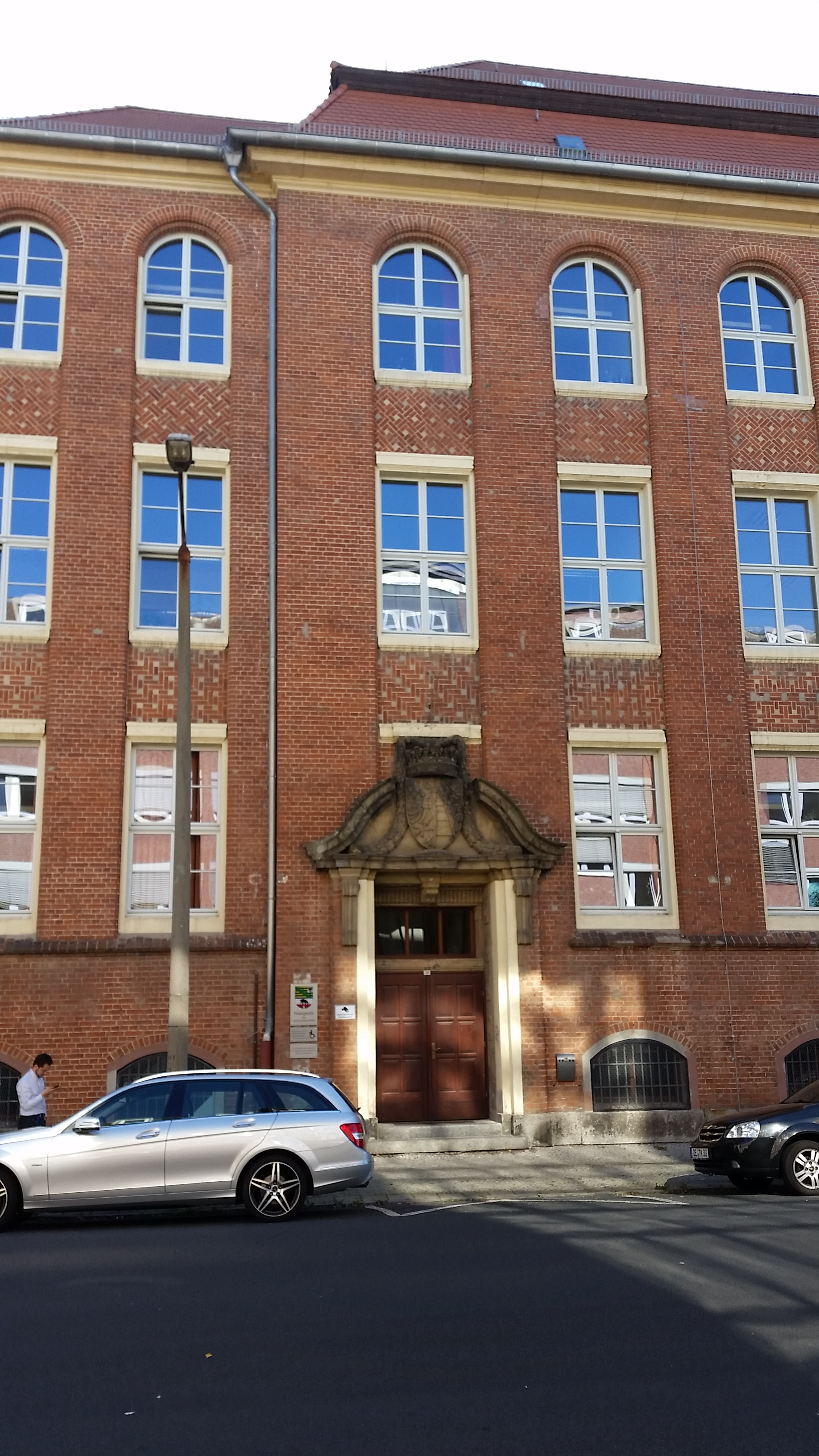 Gebäude des ehemaligen Verwaltungsgerichts Dessau, Mariannenstraße 35 in Dessau-Roßlau